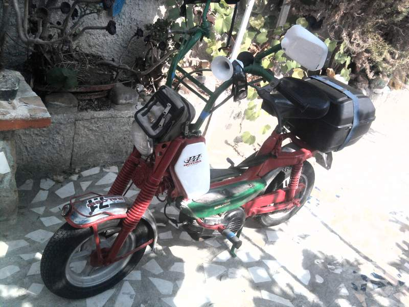 Marca: CIMATTI - Modello: MINI CHIC - Cilindrata: 49.6 cm³ - Cavalli: 1,232 - Data Immatricolazione: 26/03/1972